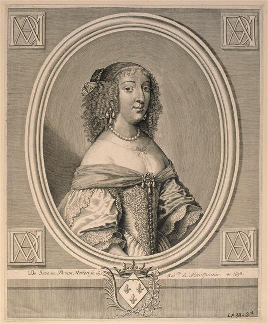 Portrait of Mademoiselle de Montpensier, Anne Marie Louise d'Orléans